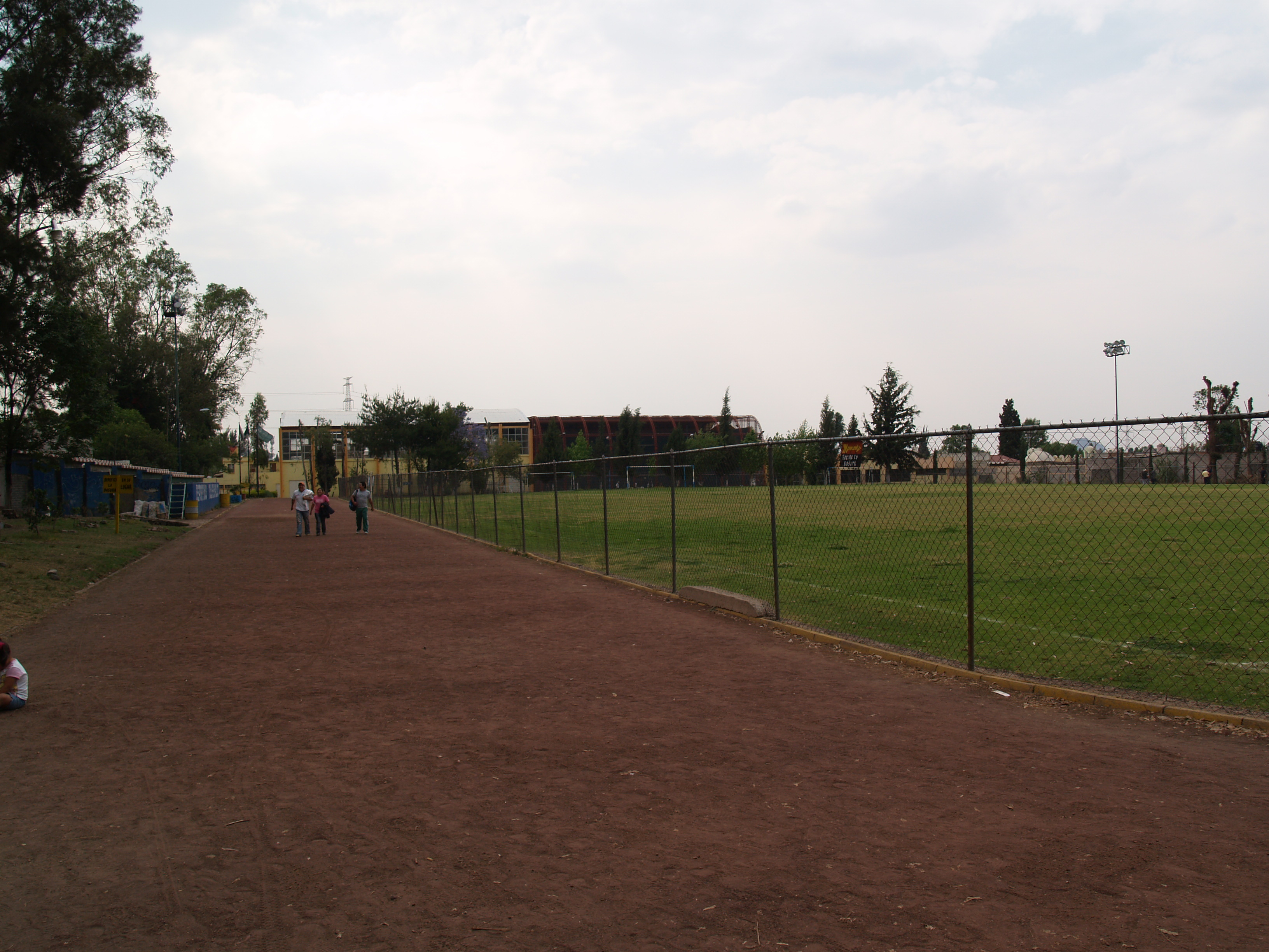 Deportivo de "Las animas" en Santiago Tulyehualco